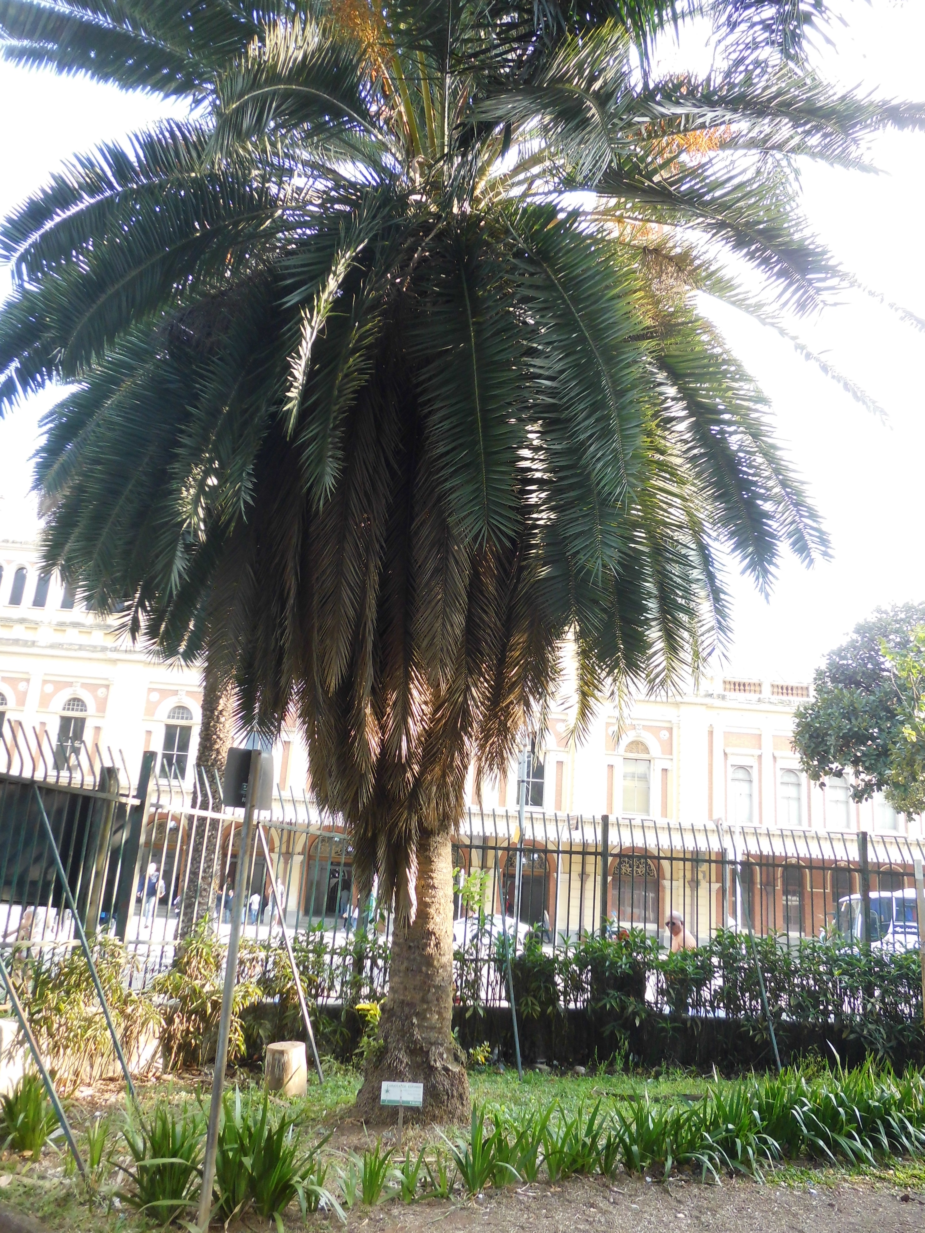 Exemplar da arvore Cariota de espinho (Aiphanes aculeata) presente no parque Jardim da Luz (São Paulo-SP, Brasil).